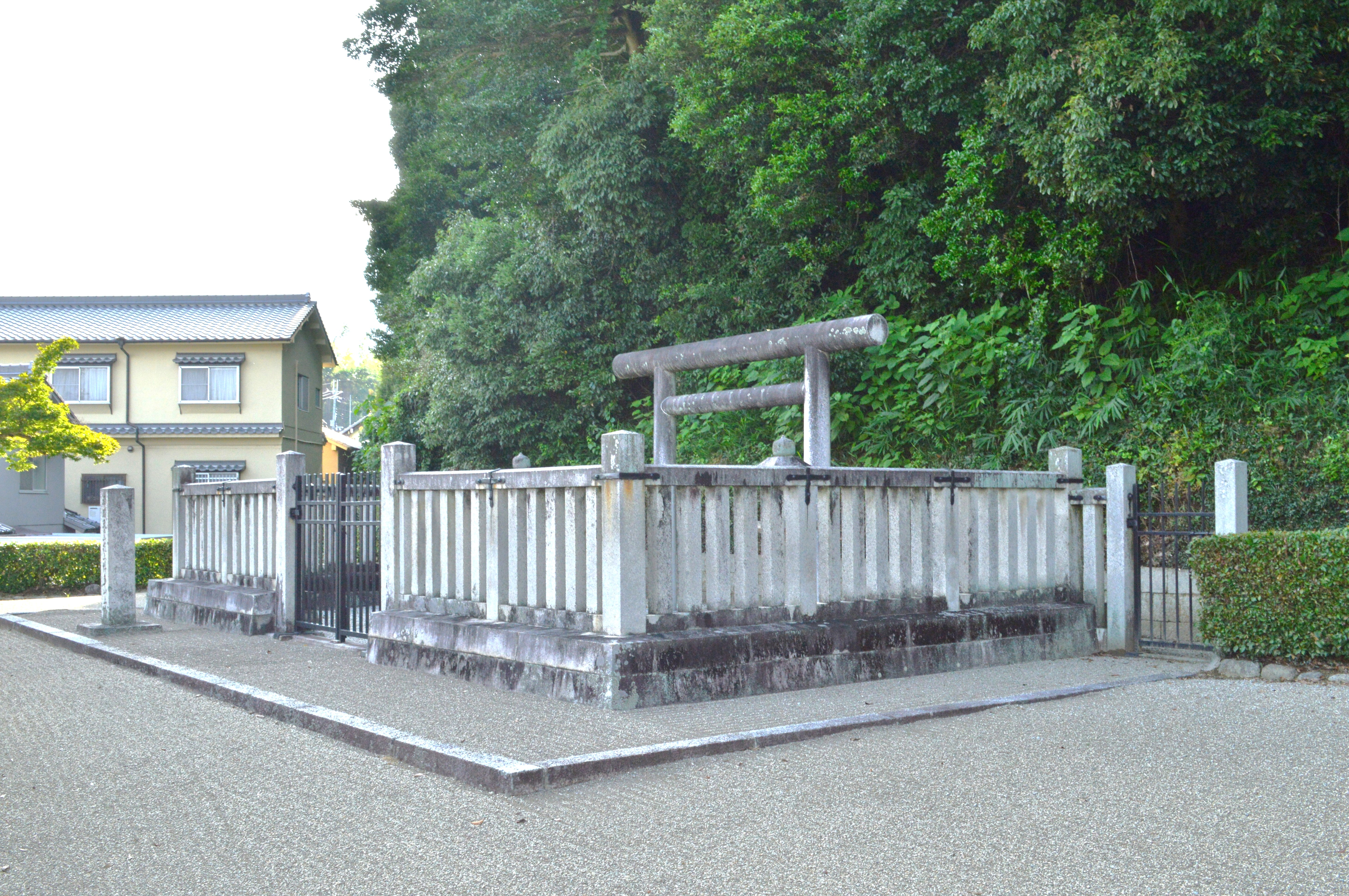 孝昭天皇掖上博多山上陵 拝所